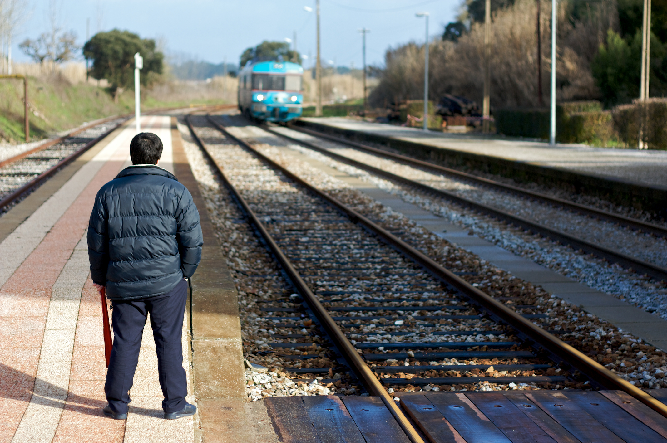 aguardando o cruzamento com o InterRegional 800 Coimbra-B - Caldas da Rainha. Tipo: E Estação Local: Monte Real Linha do Oeste, PK 172 Data e hora: 24 de Janeiro de 2009 10h03